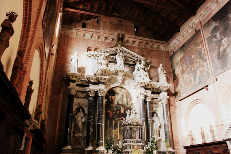 L'altare maggiore di San Benedetto Vecchio